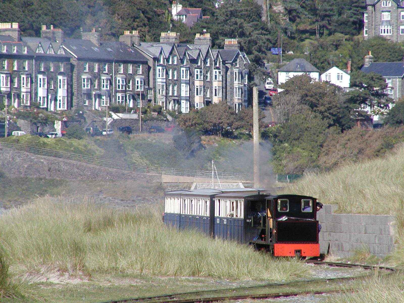 Rheilffordd Fairbourne, Ffriog